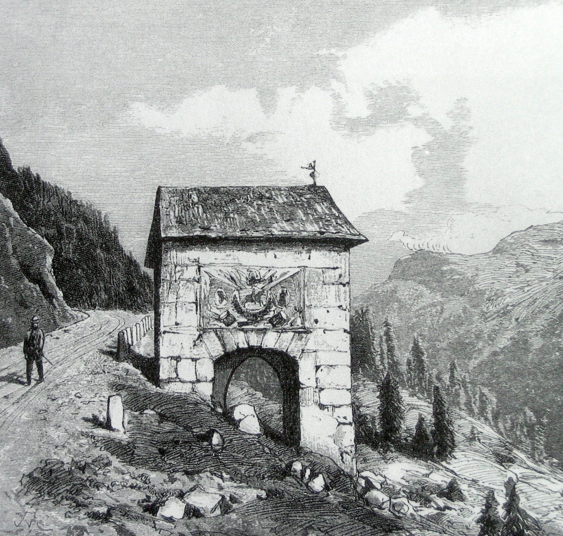 Die Porclas um 1865 von Süden. Holzschnitt von Themistocles von Eckenbrecher (1842 - 1921)